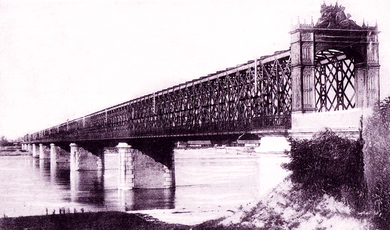 Il ponte ferroviario di Piacenza, esistito dal 1865 al 1931